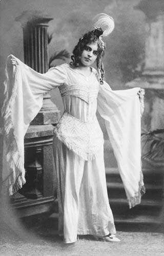 Krecsányi Vera magyar színésznő. Krecsányi Ignác nevelt leánya. 1895–1917 között atyja társulatában szerepelt.